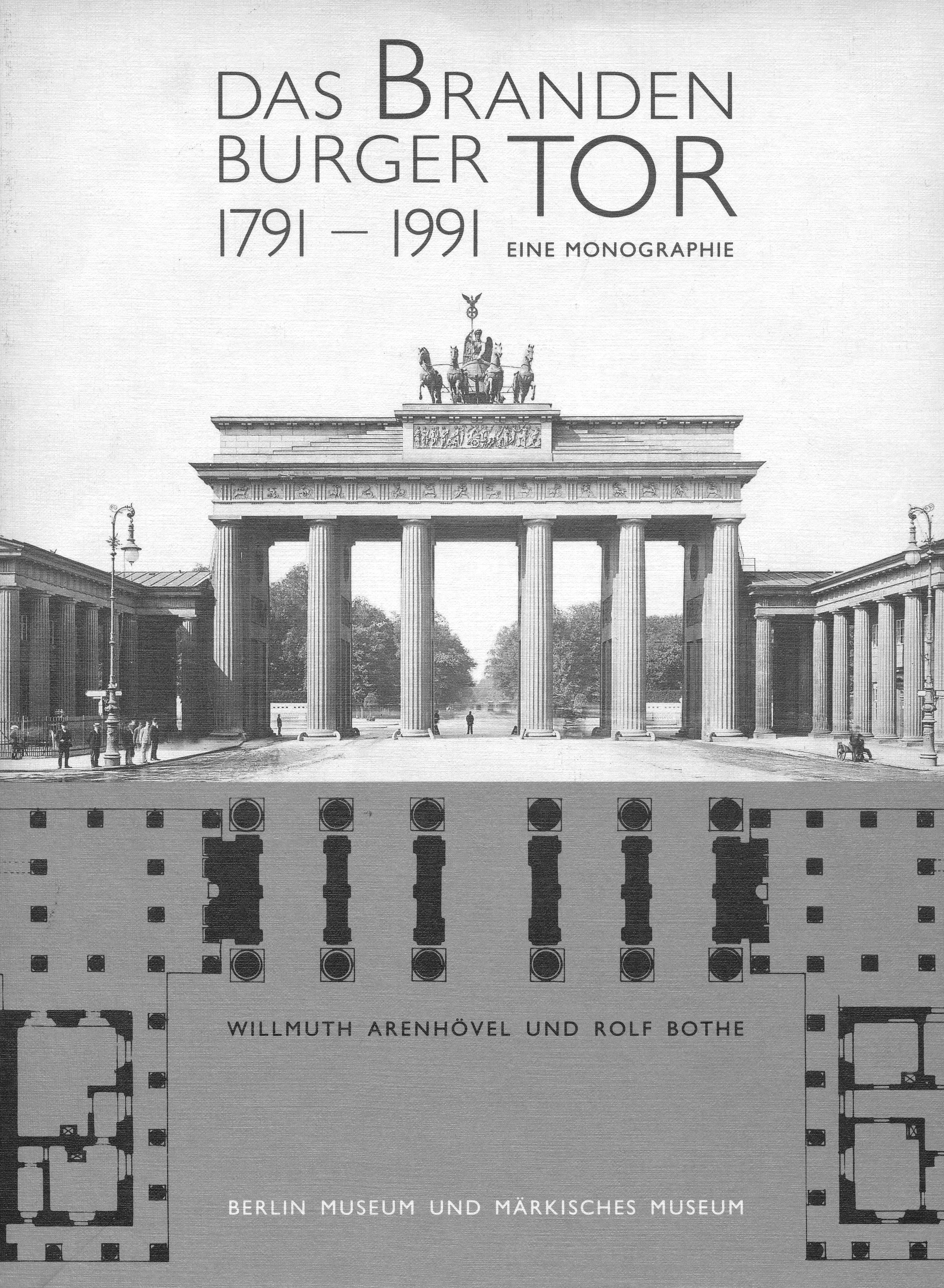 F. A. Schwartz, Das Brandenburger Tor, Foto vor 1900, Stiftung Stadtmuseum Berlin